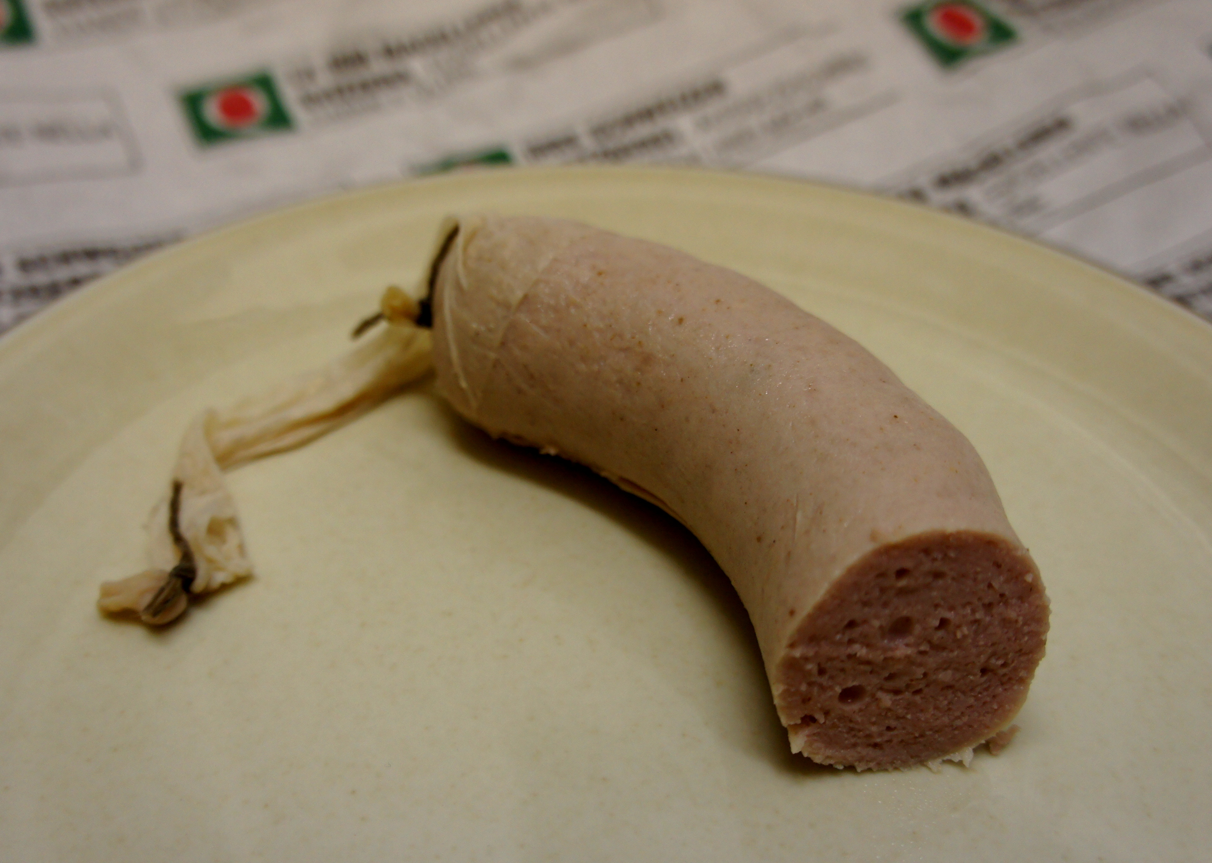 Eine Appenzeller Siedwurst, gekocht, angeschnitten und die Haut teilweise entfernt.